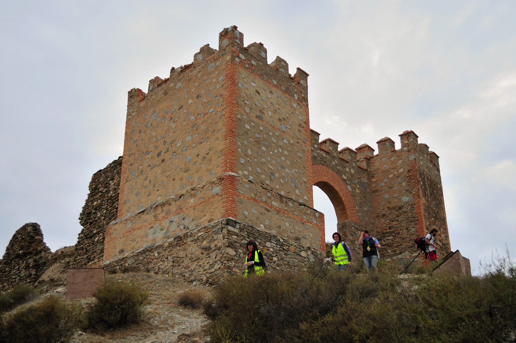 Desierto de Tabernas This is a photography of a Special Area of Conservation in Spain with the ID: ES0000047. Natura2000 entry, EEA entry